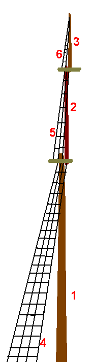 Esquema básico de un mástil y sus jarcias muertas Mast: rigging and mast extension traditional sailing ships explanation on scheepsmast